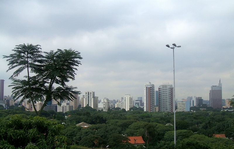 Vista do Distrito de Pinheiros, a partir da Praça Coronel Custódio Fernandes Pinheiros, no Distrito de Alto de Pinheiros. Cidade de São Paulo, Brasil.